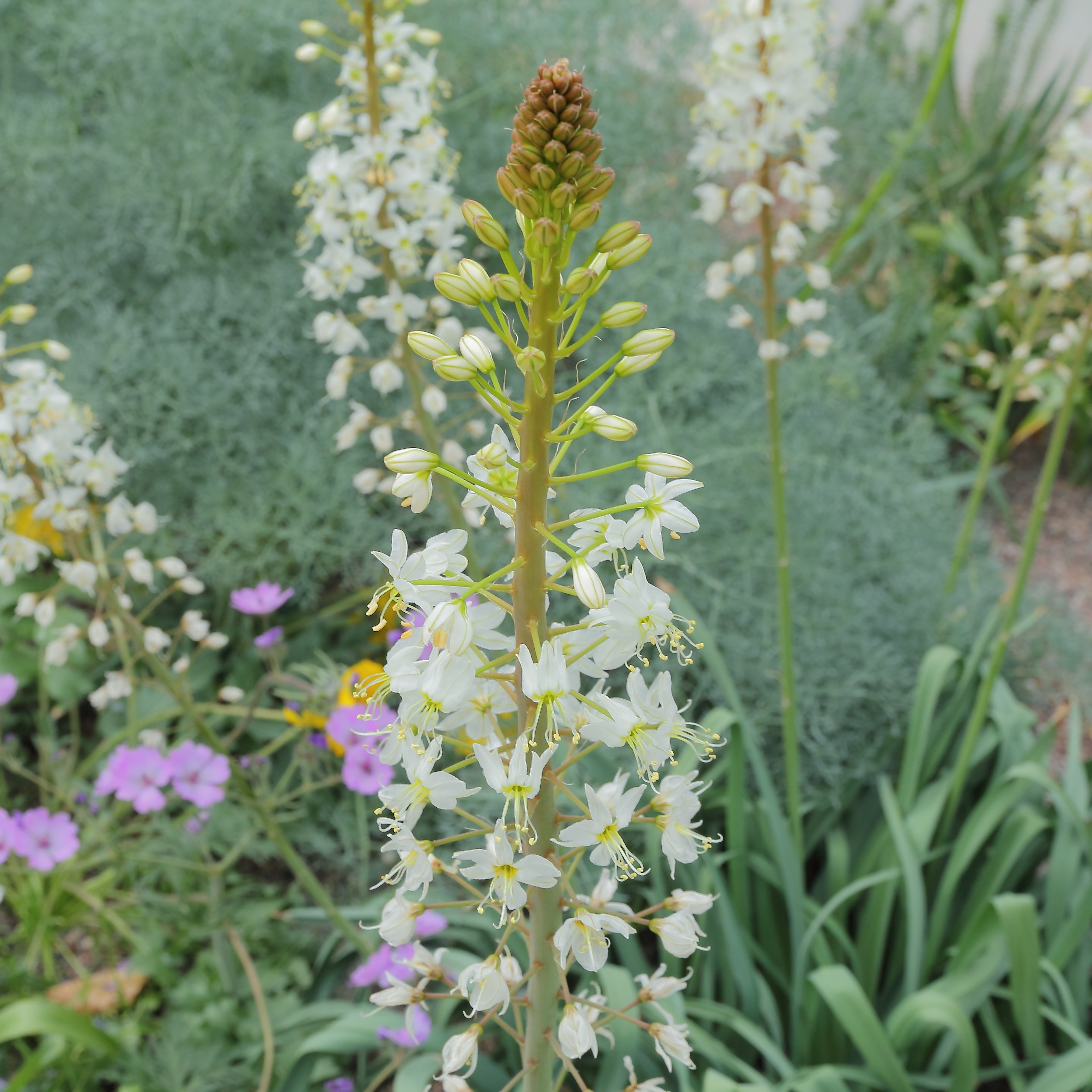 Eremurus lactiflorus i Göteborgs Botaniska Trädgård.